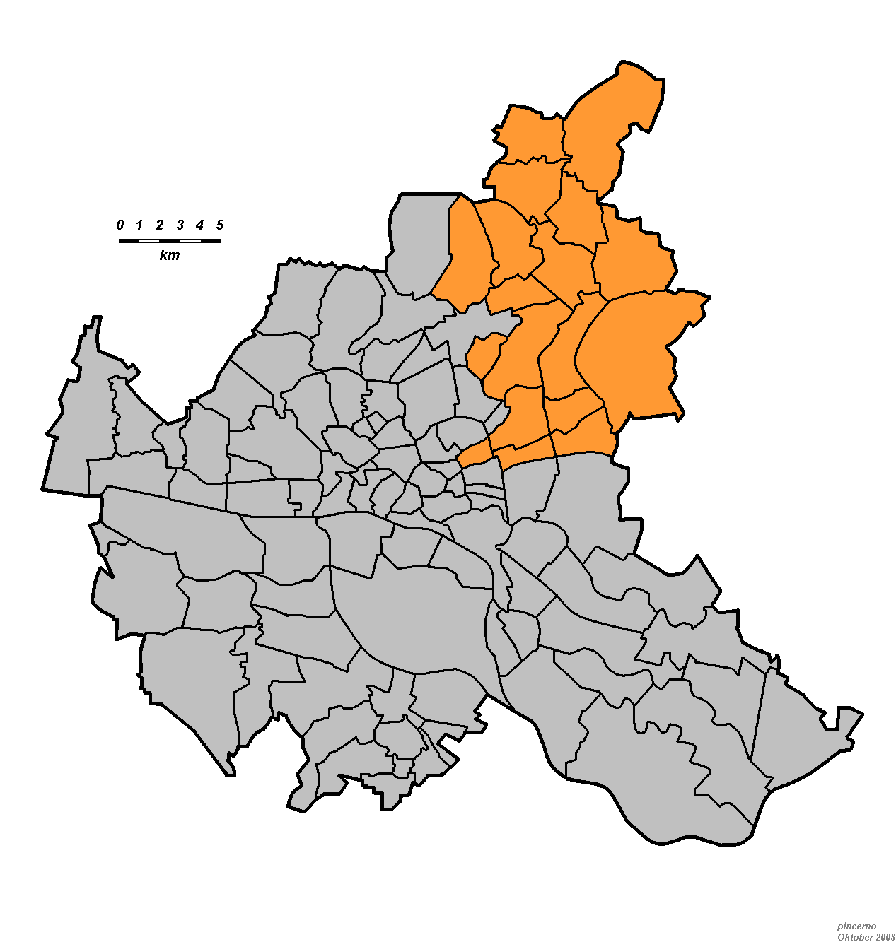 Bezirk Wandsbek in Hamburg.